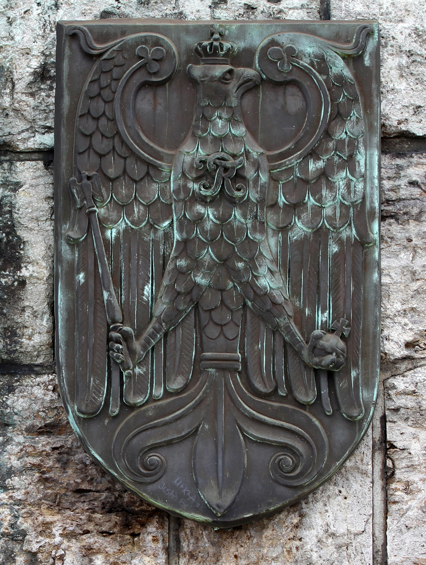 Köln Altstadt-Nord, Hohenzollernbrücke. Reichsadler am Denkmal Friedrichs III.